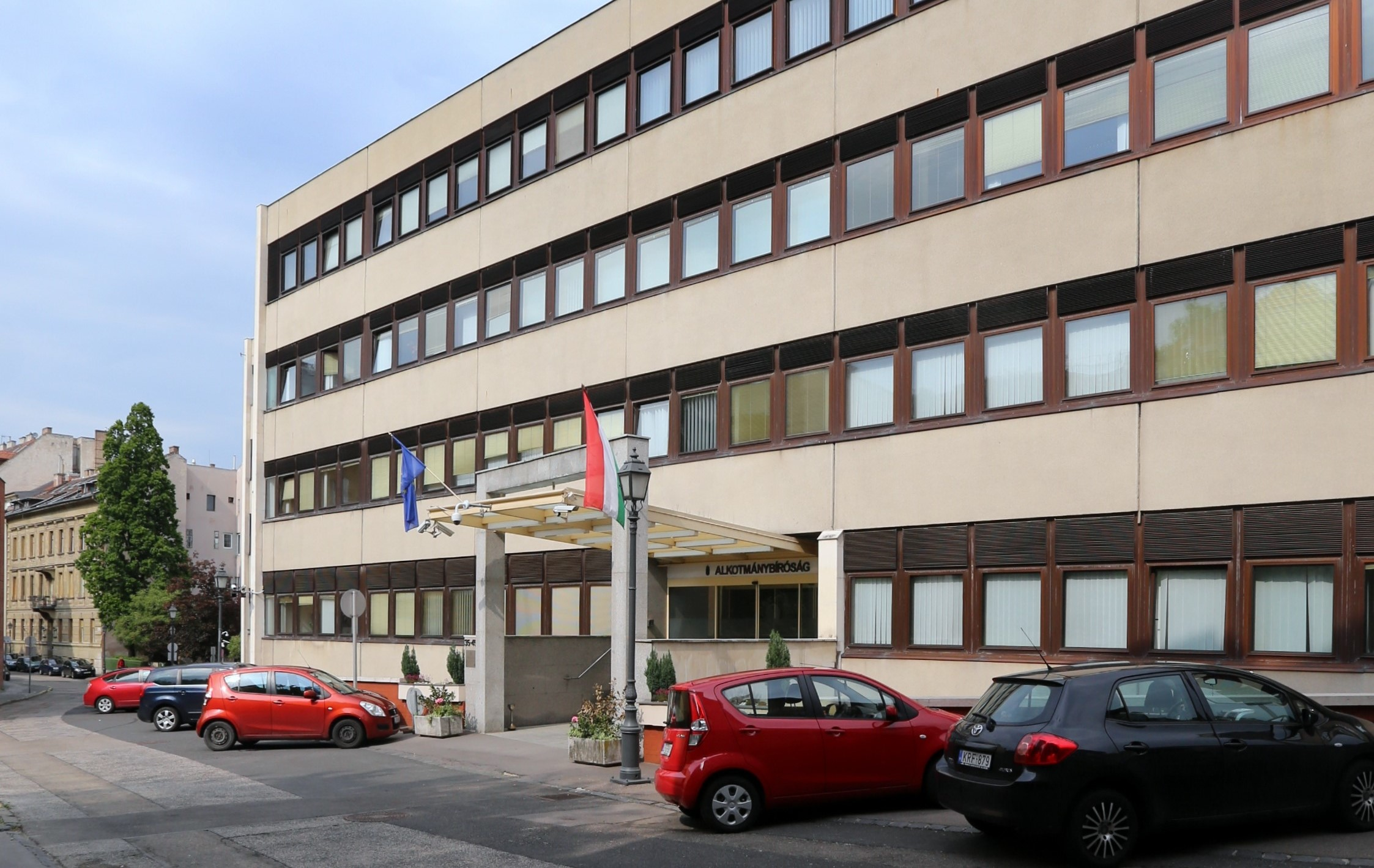 Az Alkotmánybíróság épülete Budán, a Donáti utcában